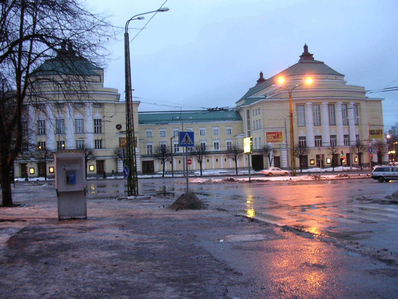 Teater Estonia